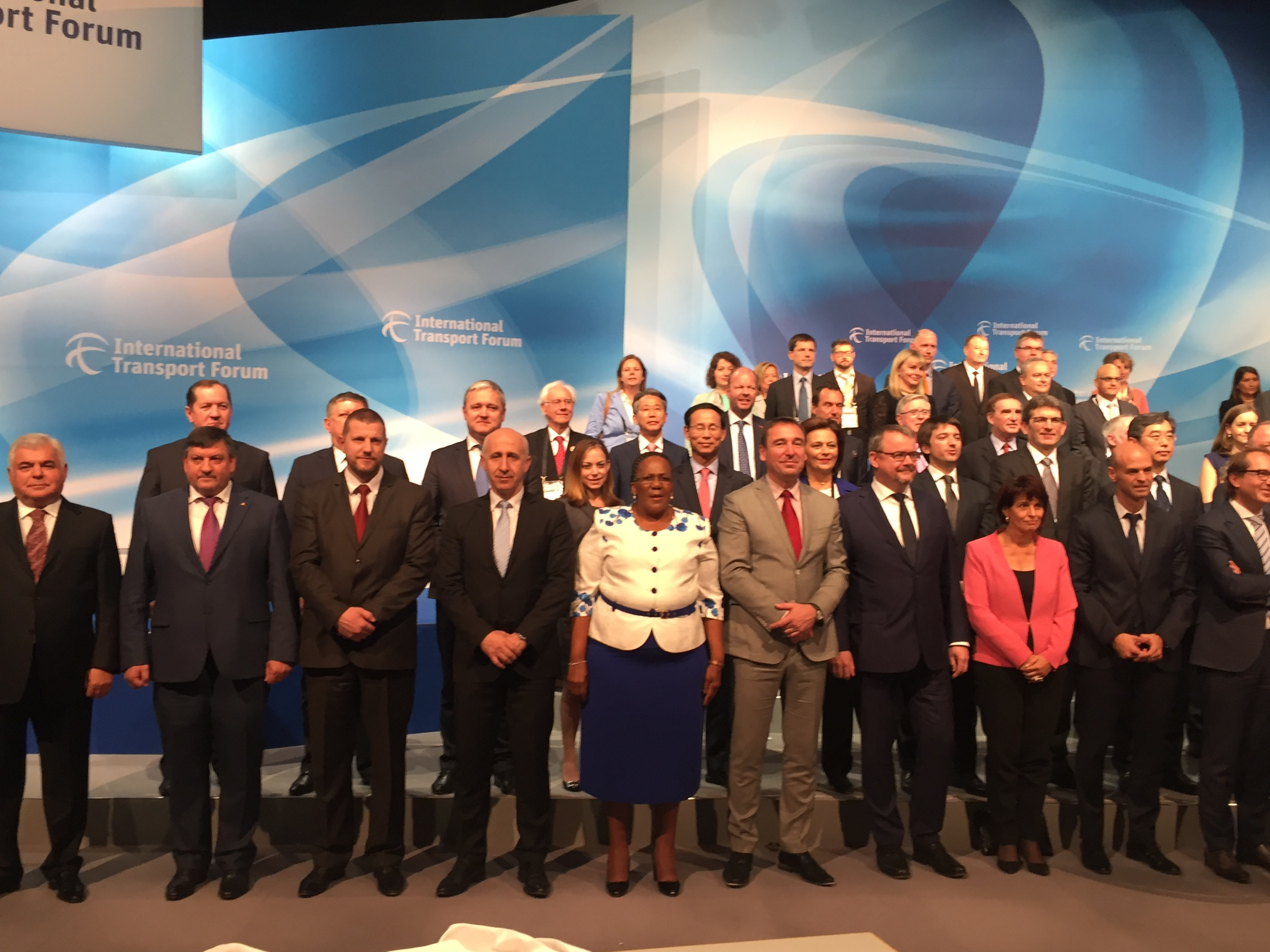 Miniștrii Transporturilor la forumul global de transport ITF